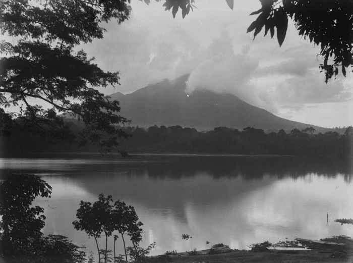 Foto. Het meer van Klakah aan de voet van de vulkaan Lamongan